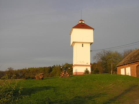 Vodarenska vez v Tynisti, okres Plzeň-jih.